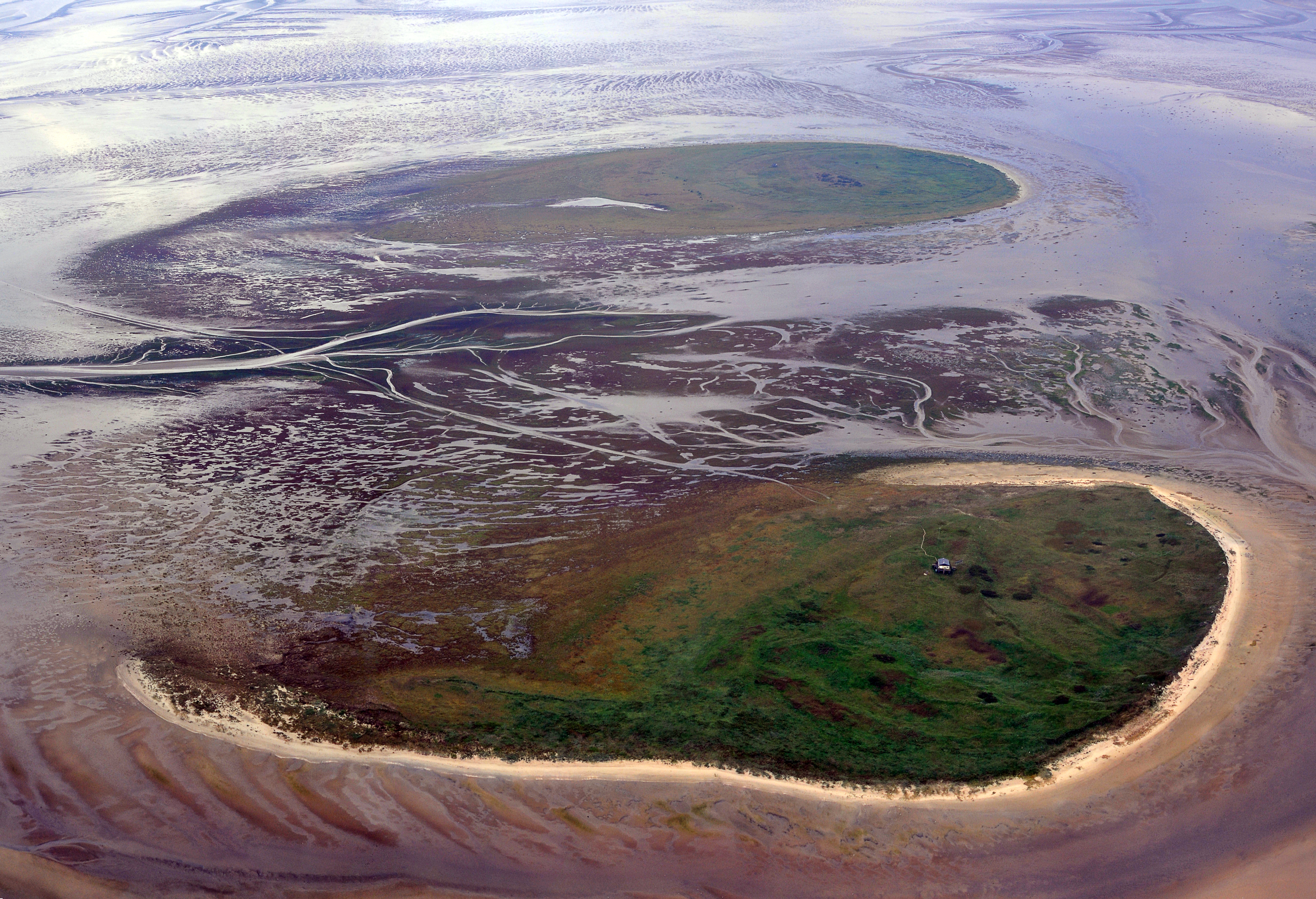 Fotoflug Nordsee, Scharhörn (vorne) und Nigehörn (hinten)